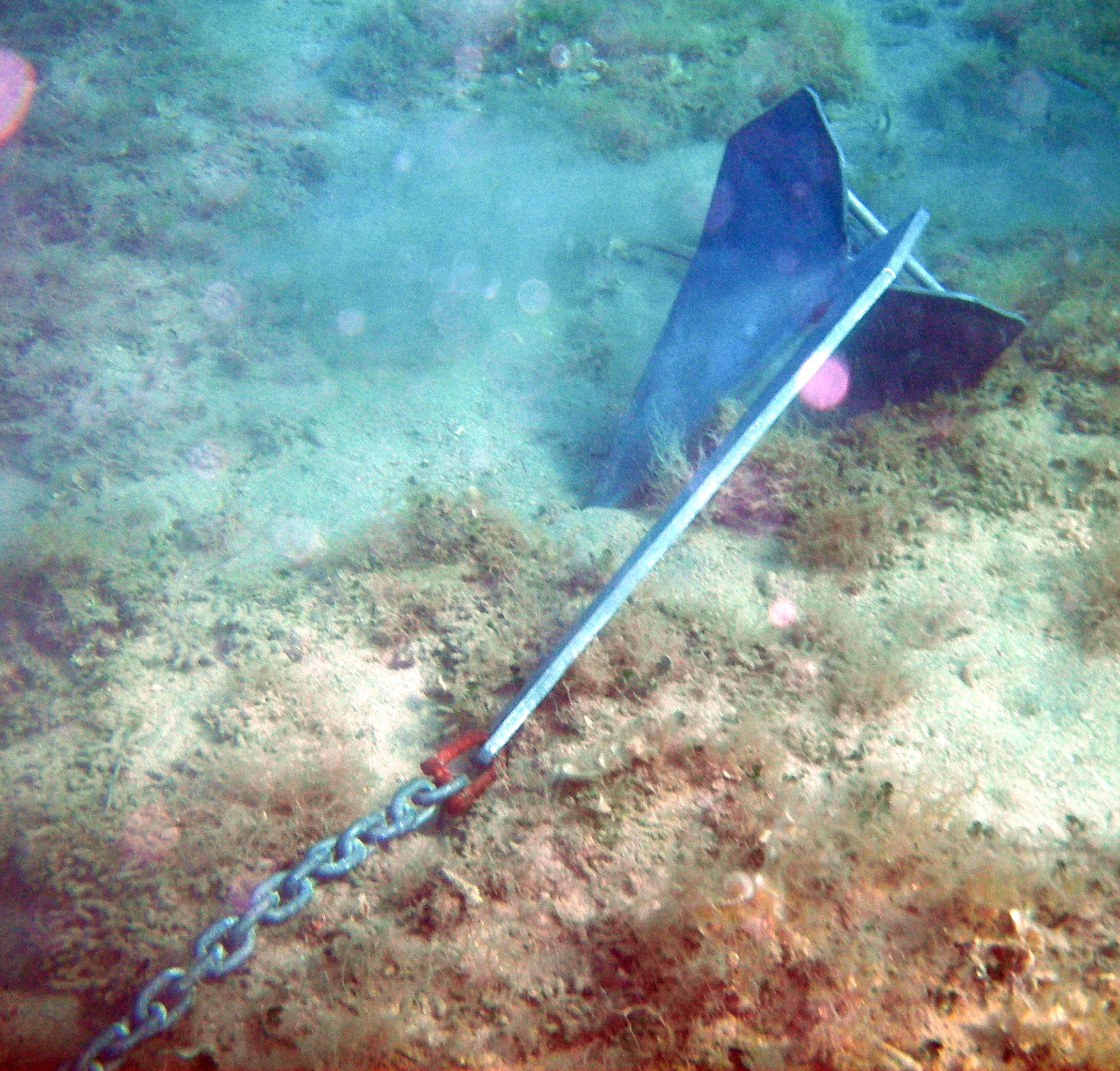 Pflugscharanker